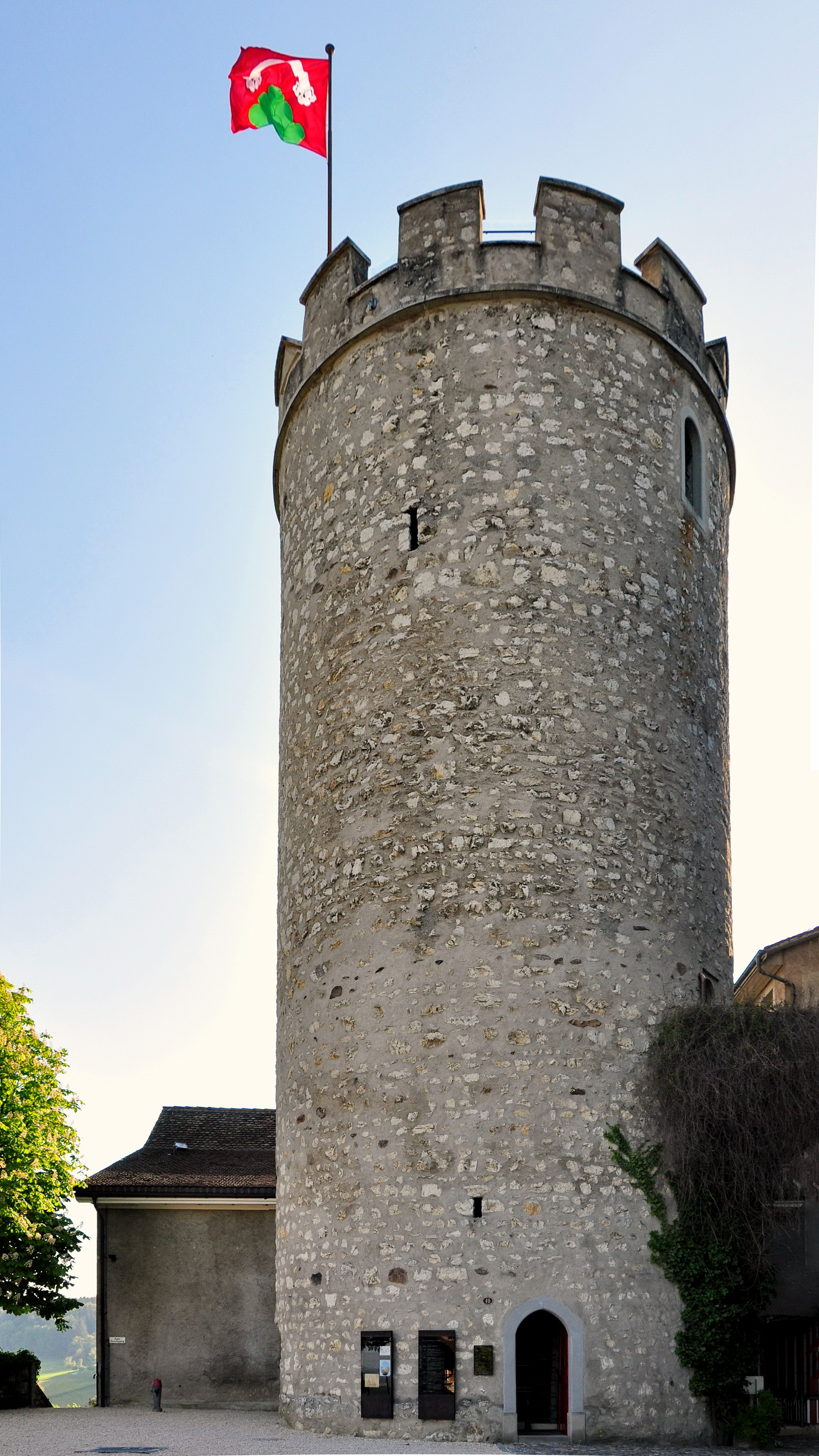 Schloss Regensberg as seen from Lägern (Switzerland)